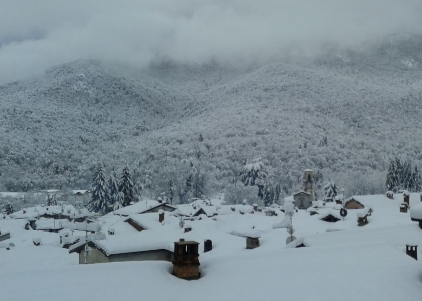 Castello Cabiaglio innevato